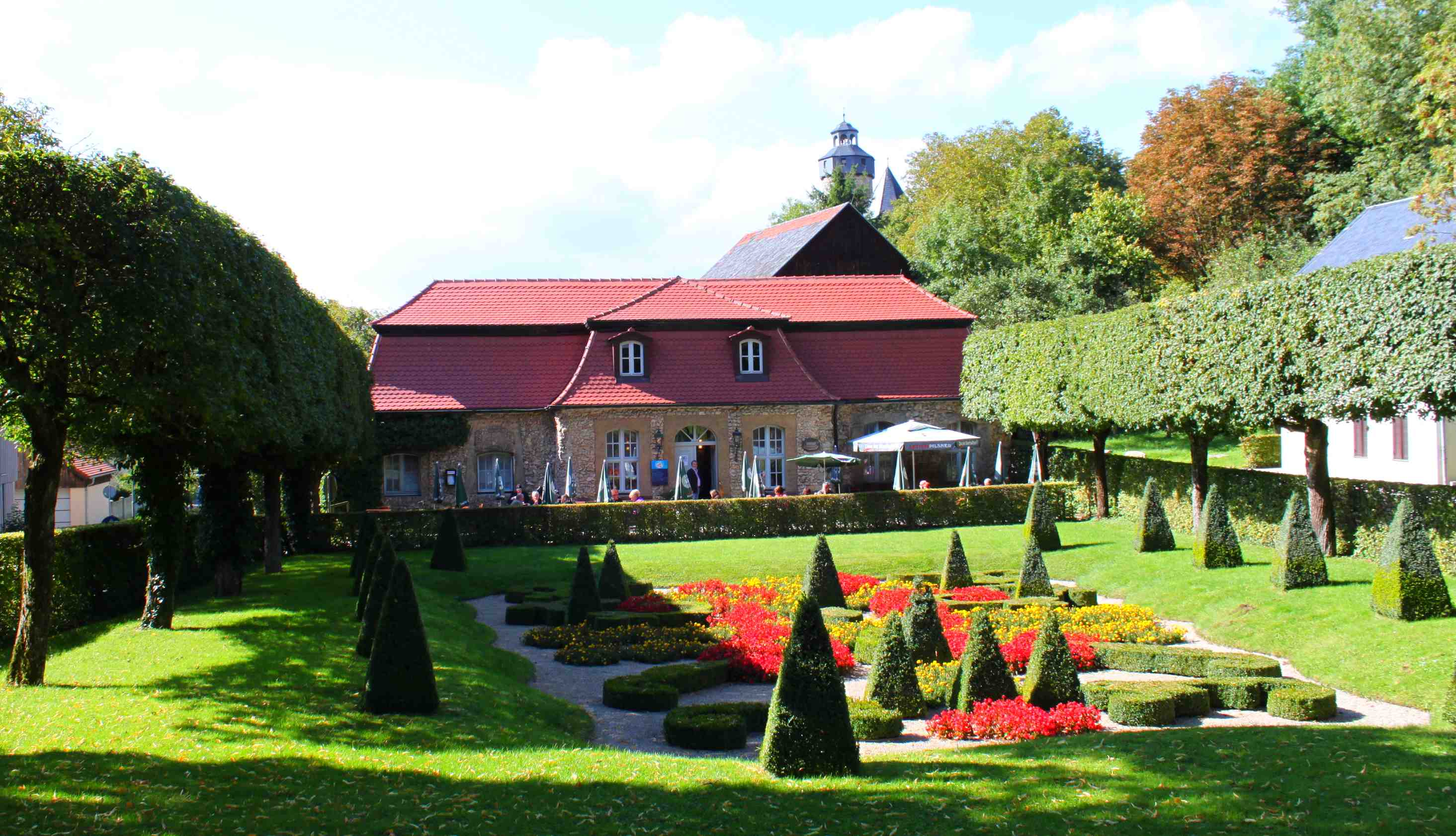 Blick vom Morgenländischen Bau auf den Küchentrakt in Saspareil